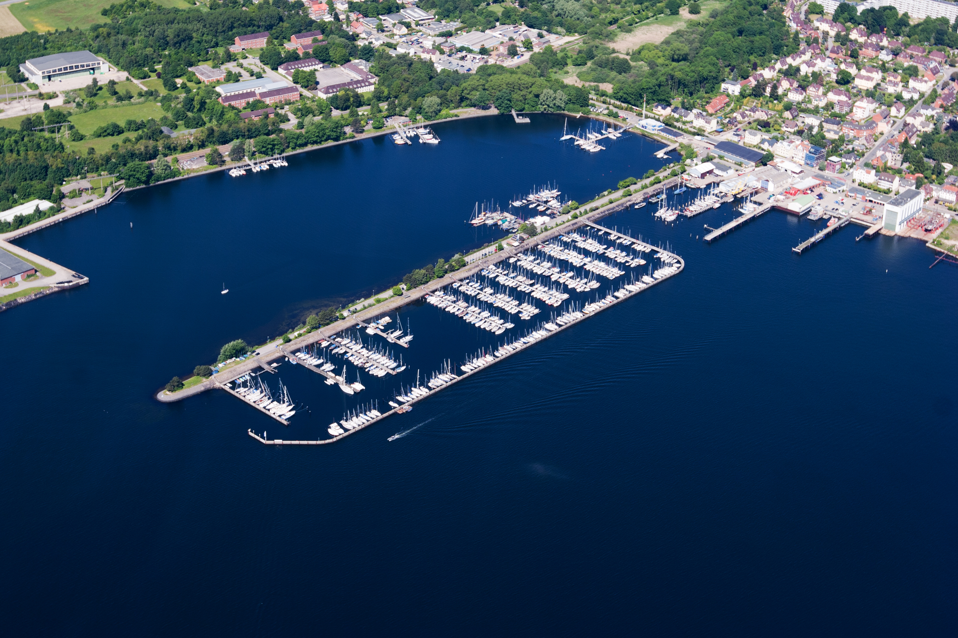 Luftaufnahme des Sporthafens Stickenhörn in Kiel-Holtenau